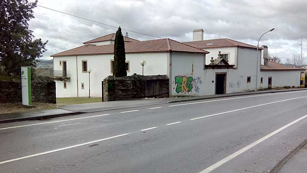 Fundación Juana de Vega, Oleiros.